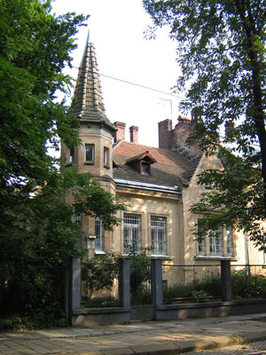 Житловий будинок у Львові (вул. Коновальця, 71). Архітектор Іван Левинський (1906).